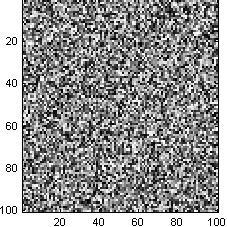 White noise image